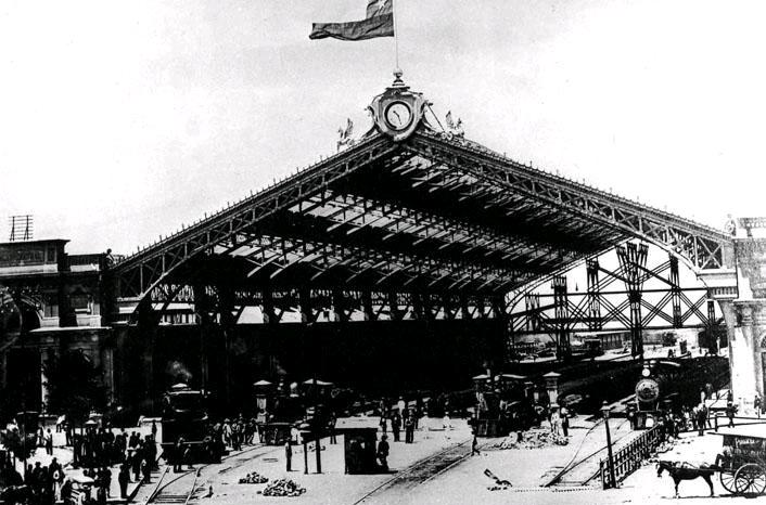 Estacion Central de Santiago de Chile.